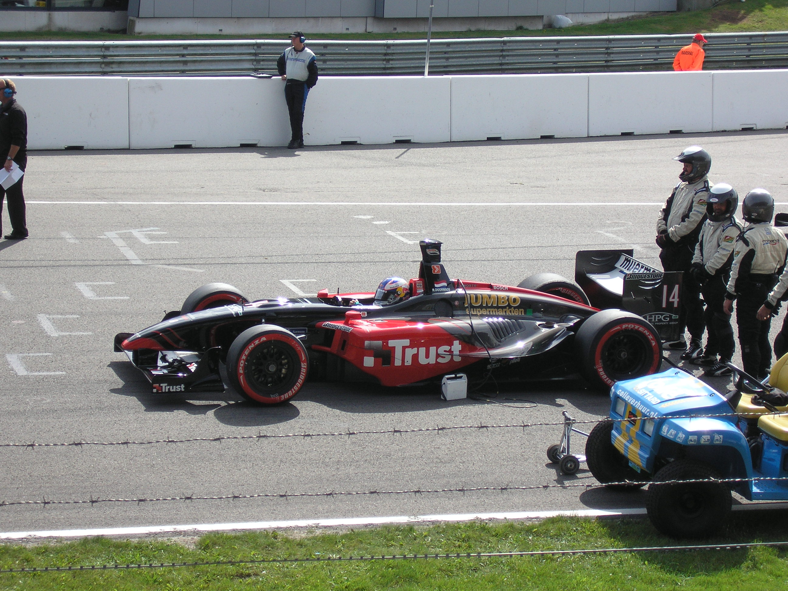 Robert Doornbos en zijn team staan klaar voor het volkslied op Circuit Assen.